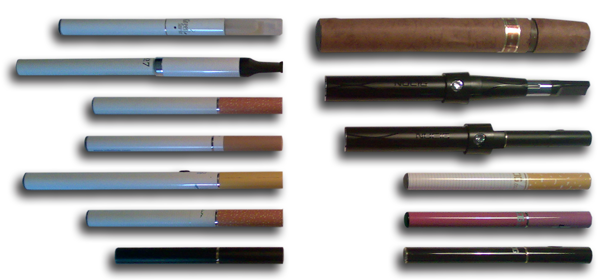 Eri merkkisiä sähkötupakoita